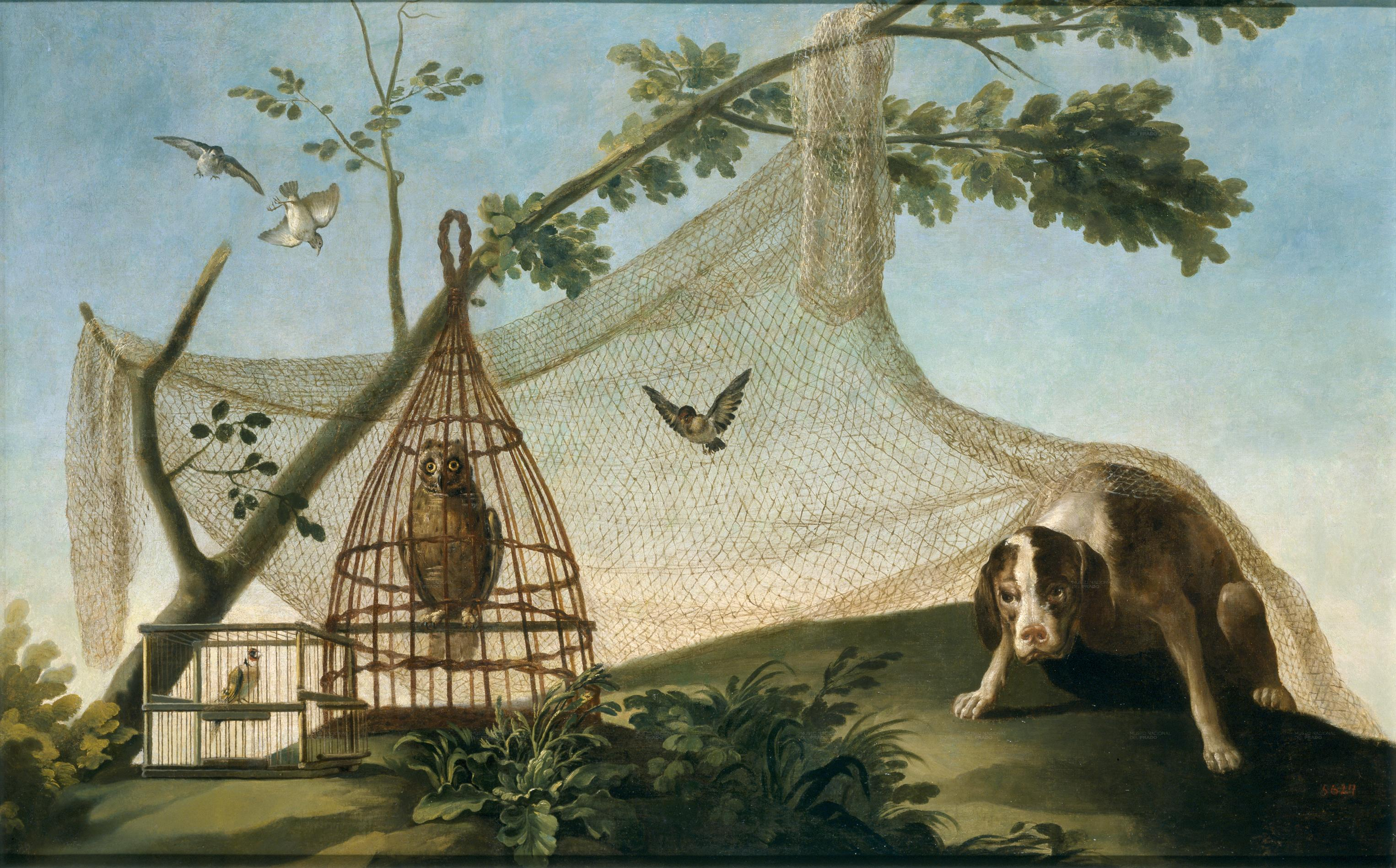 Cartones parra tapices.